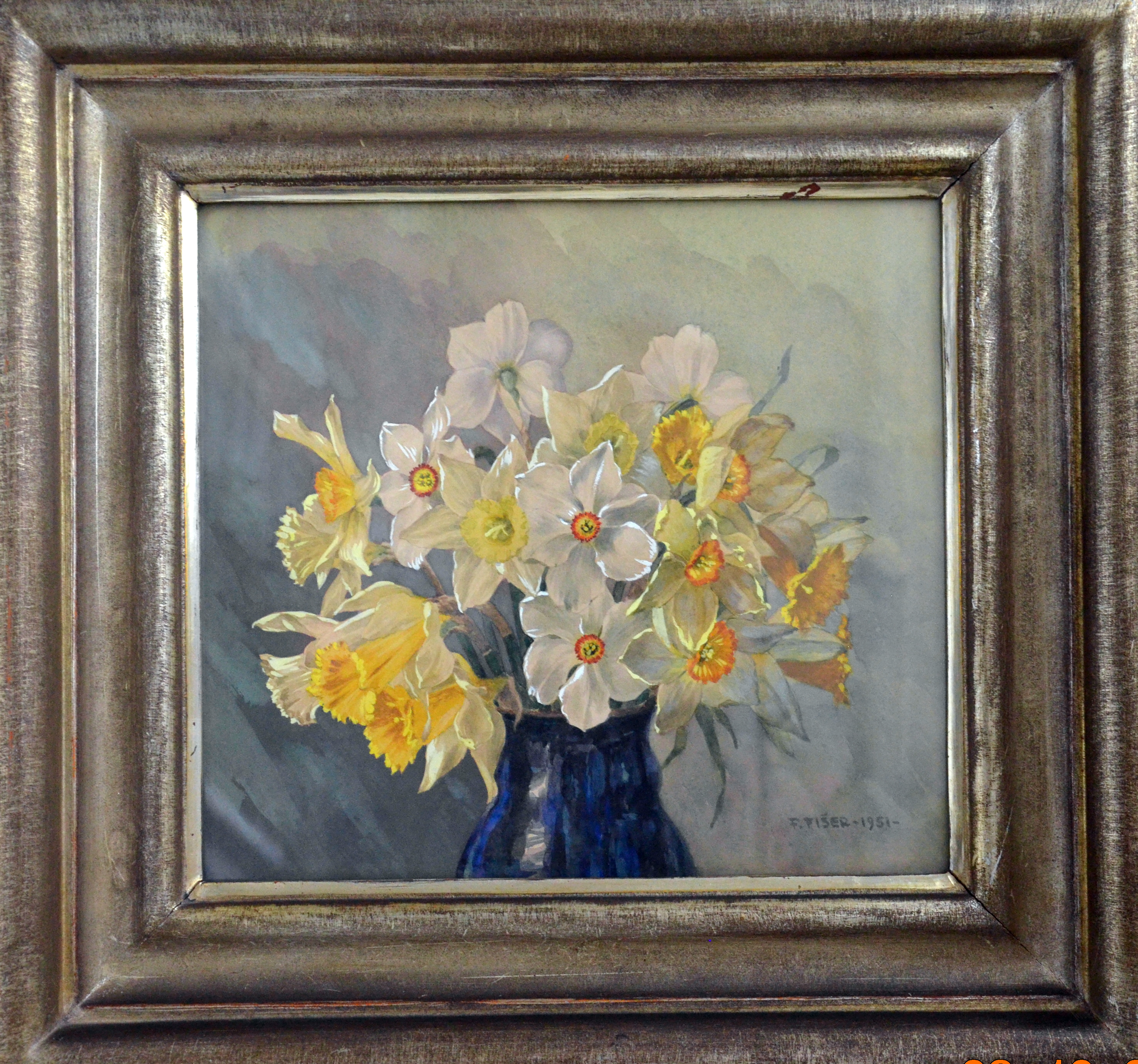 Kytice ve džbánu